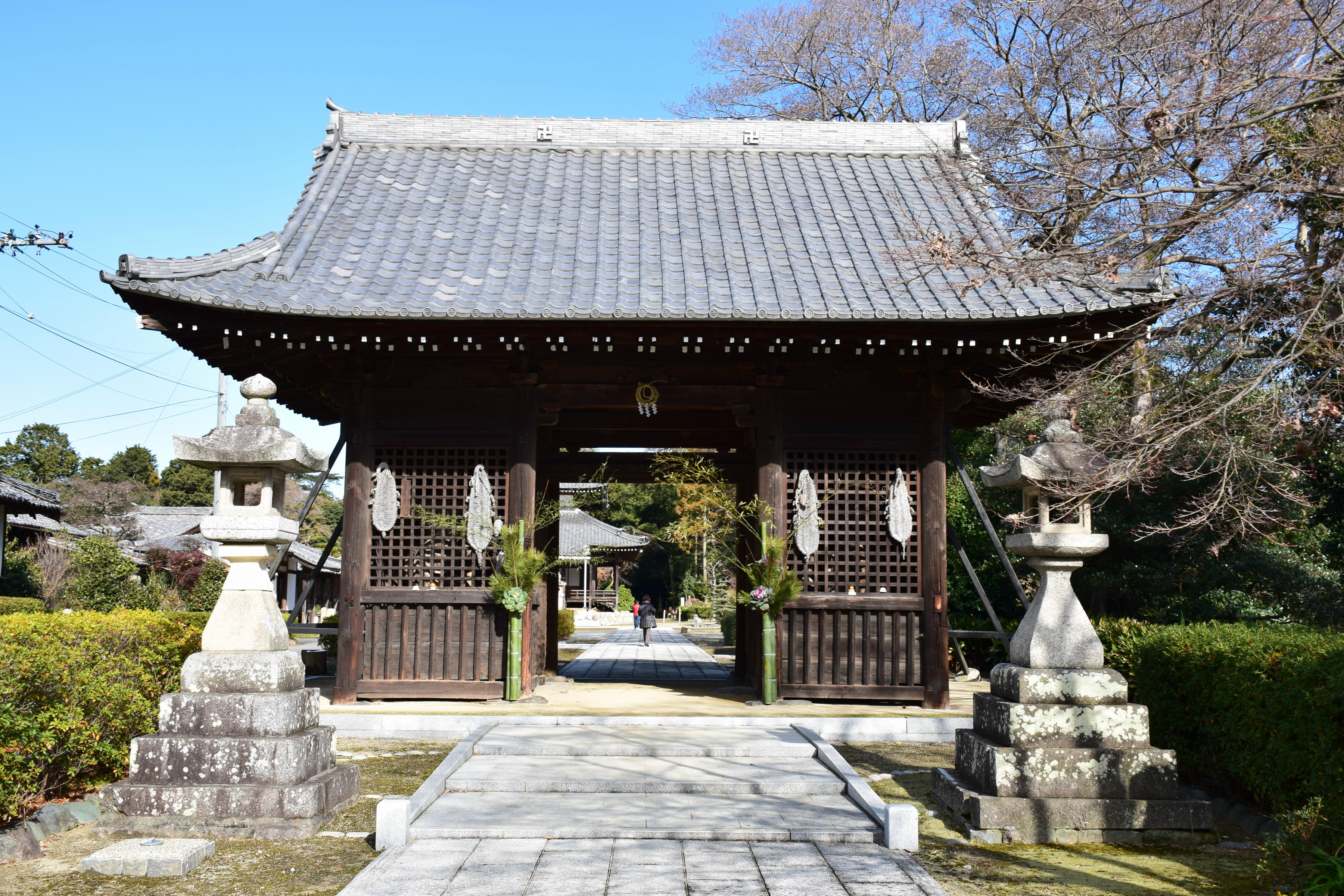 蓮華寺山門